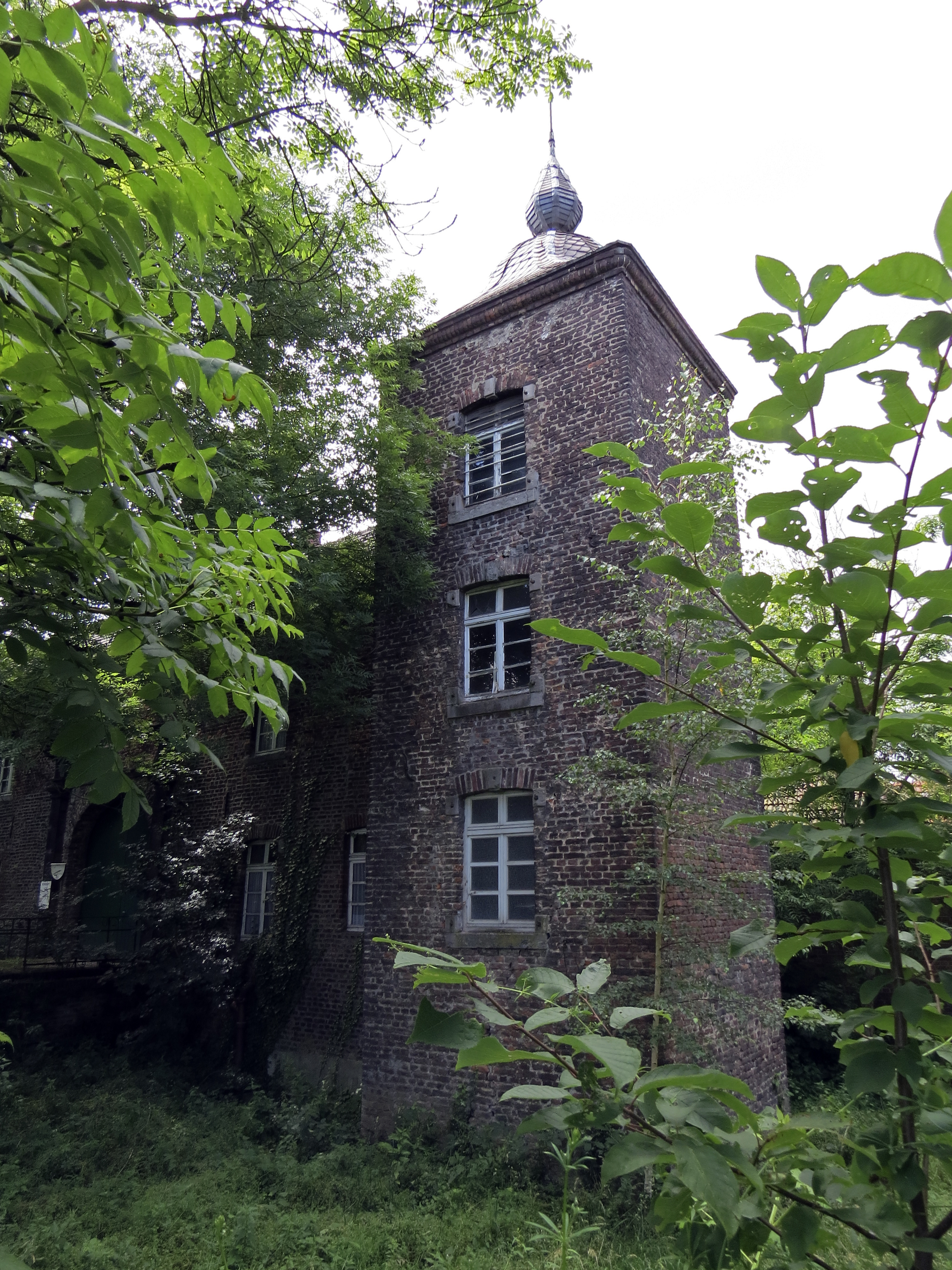 Северный Рейн - Вестфалия, Дуйсбург – усадьба Бёкум